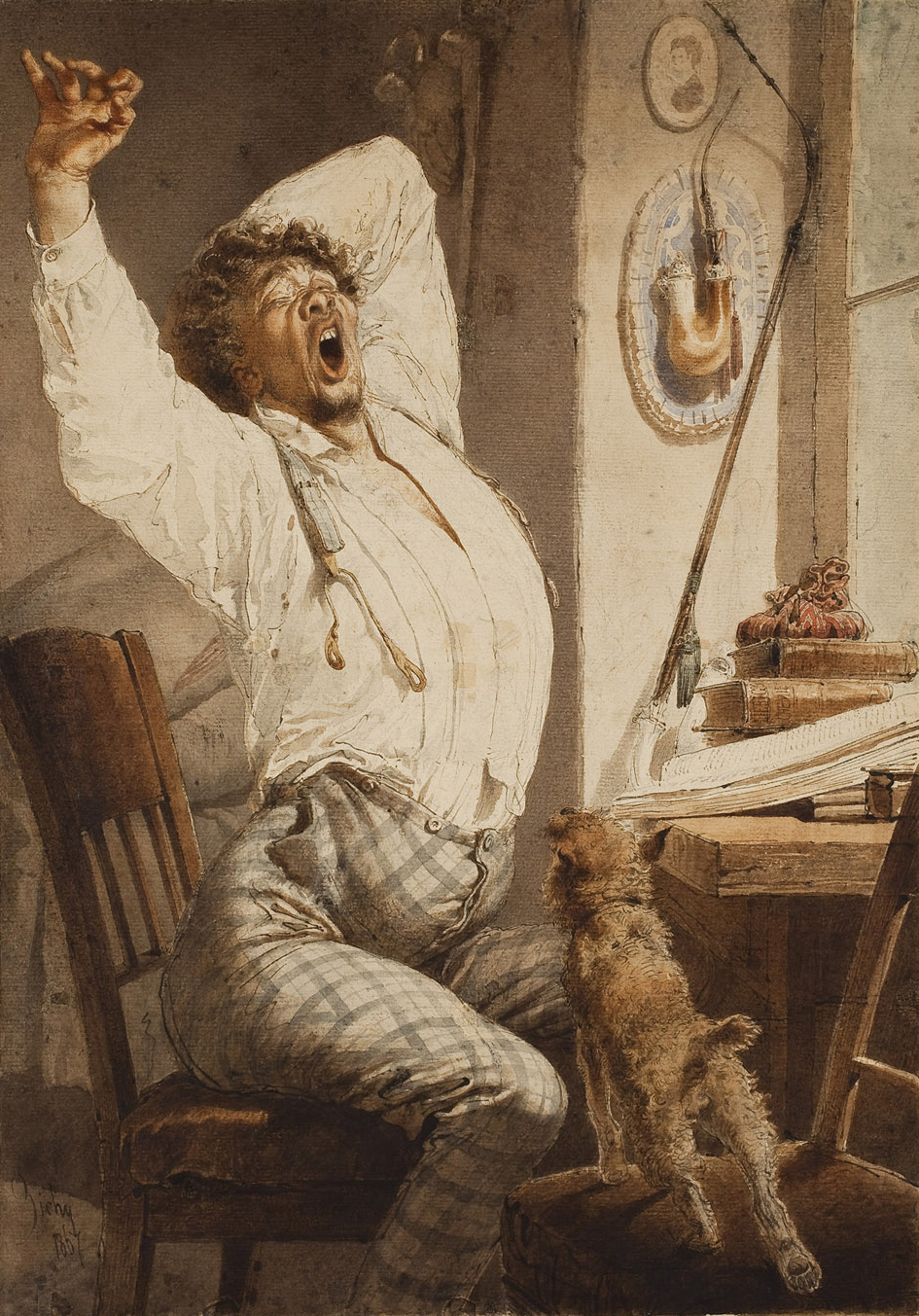 Зичи М. А. За чтением. Молодой человек (Утро). 1867. Бумага, акварель, бистр (кисть). 54,6х38,7